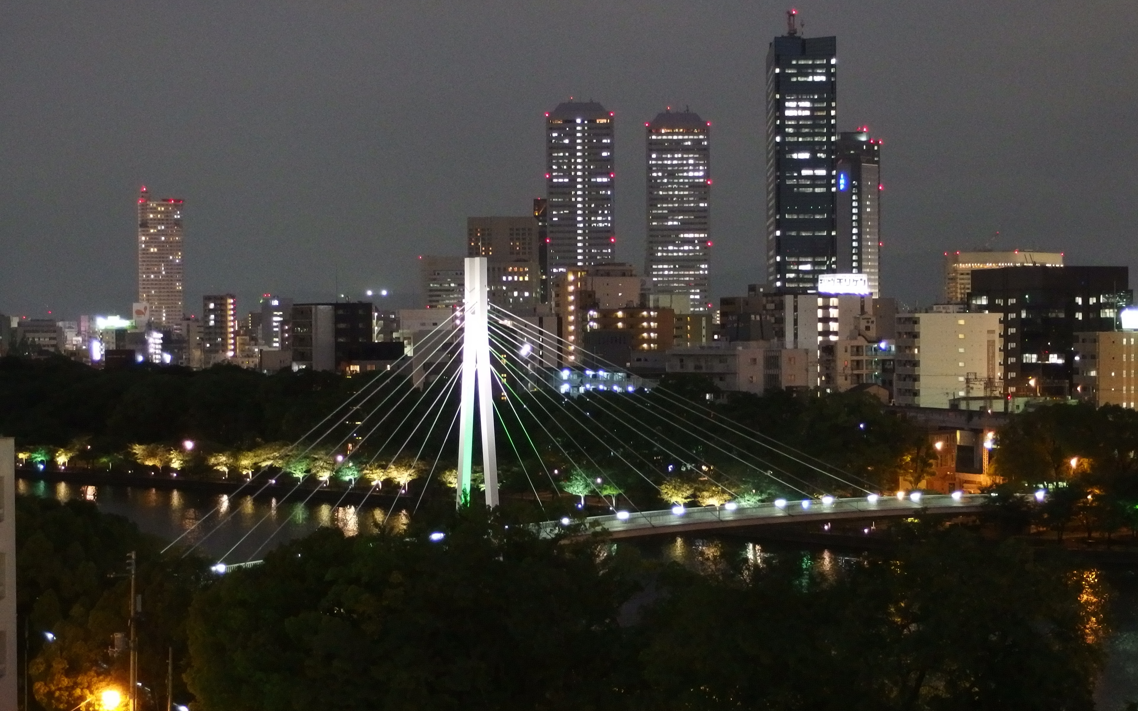 川崎橋を右岸下流から望む夜景